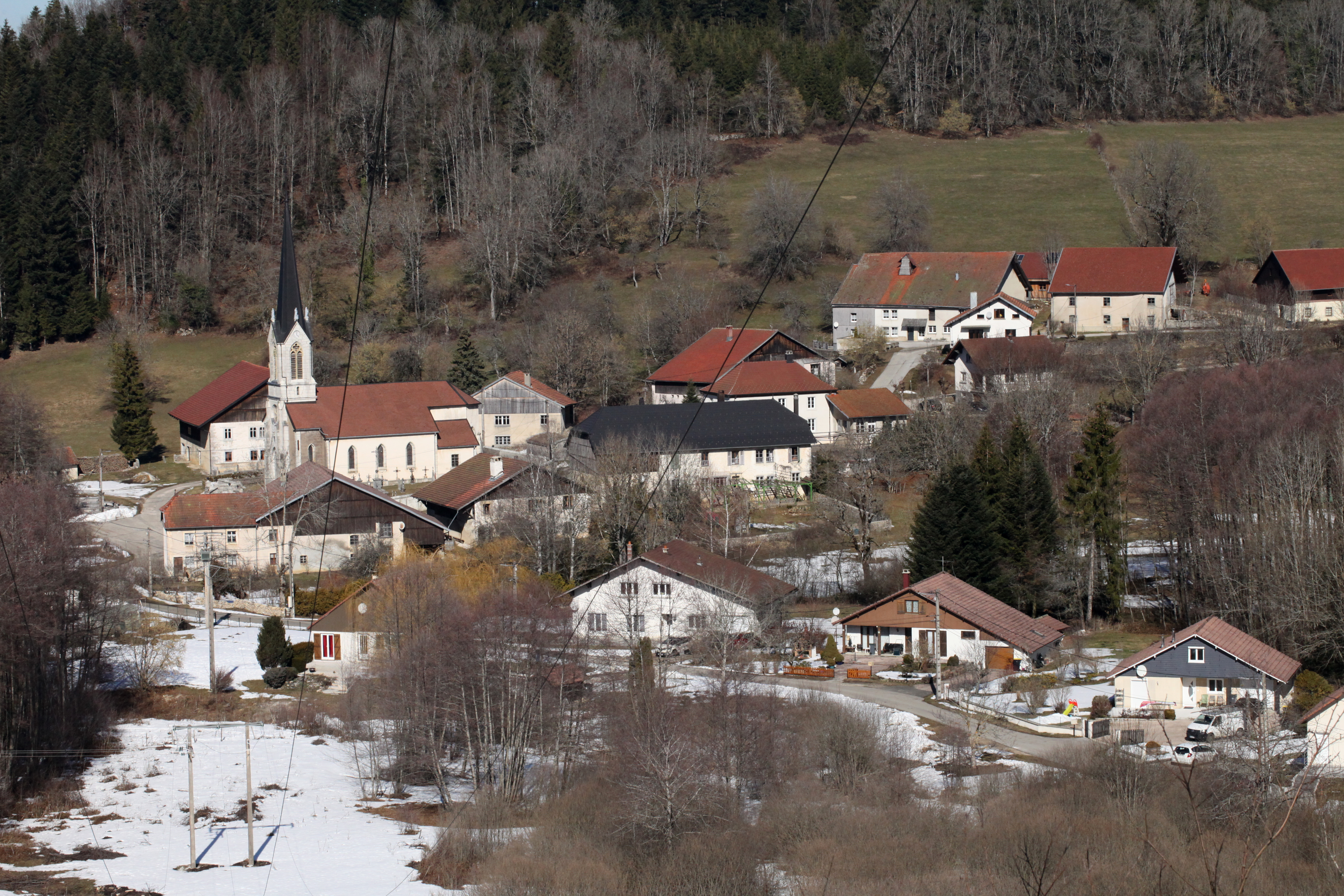 Vue du village bas de Saint-Julien-lès-Russey.